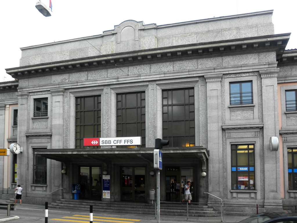 Stazione ferroviaria di Chiasso, il fabbricato viaggiatori.